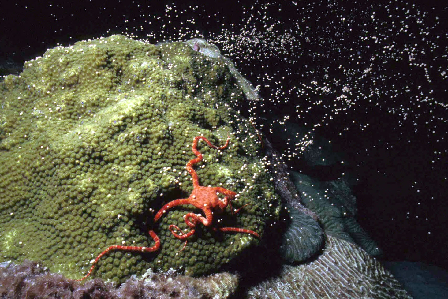 Ophioderma rubicundum sobre Montastraea franksi desovando, en Flower Garden Banks, EE.UU.